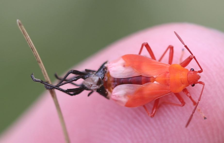 Eine Schwalbenwurzwanze (Tropidothorax leucopterus) bei ihrer letzten Häutung, am 28. Juli 2020 in der Schwetzinger Hardt